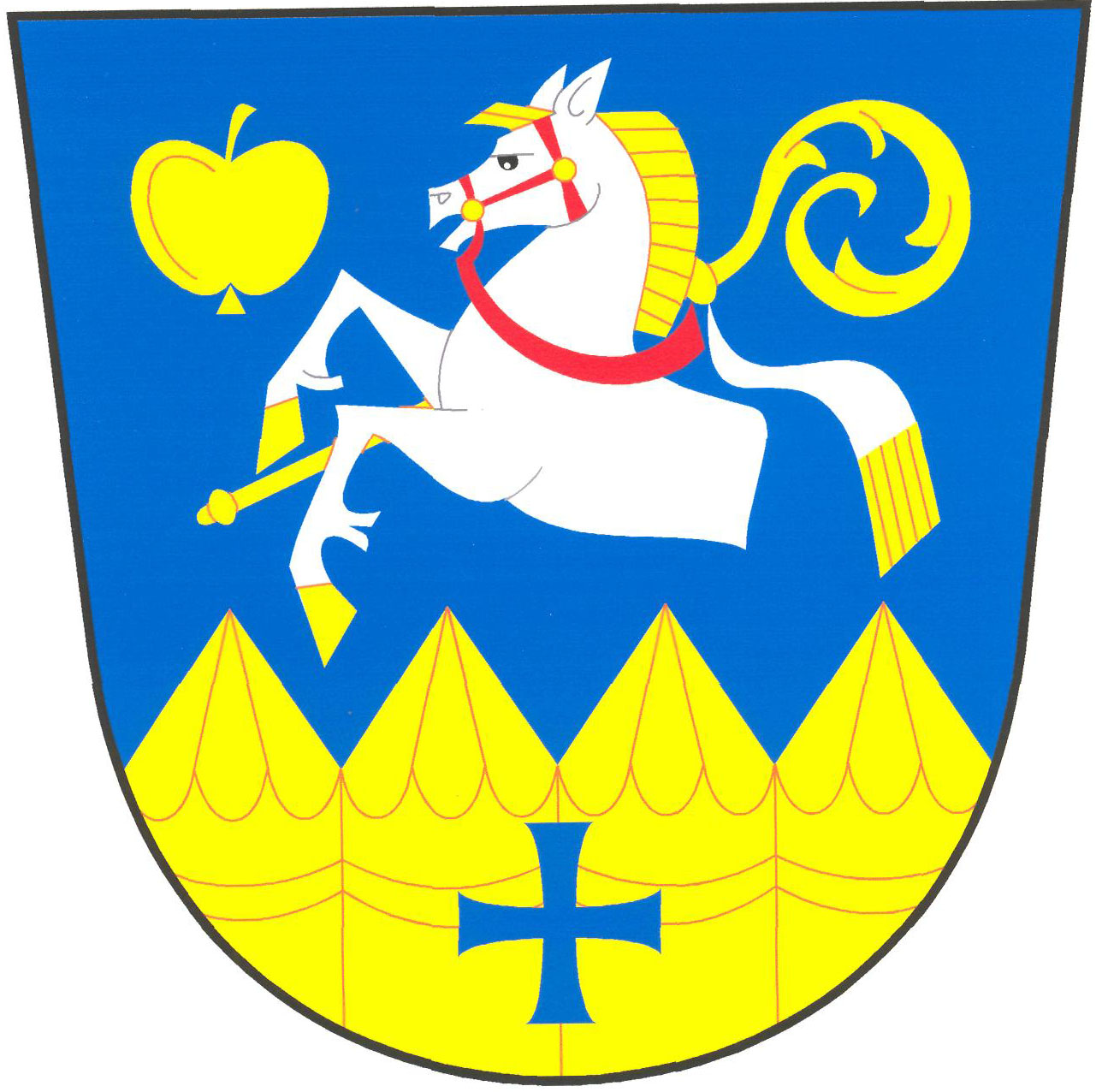 Znak obce Vítanov.